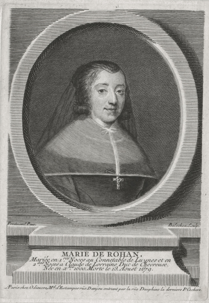 Portrait de Marie de Rohan (1600-1679)